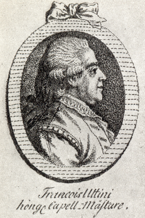 Francesco Antonio Uttini (1723-1795)